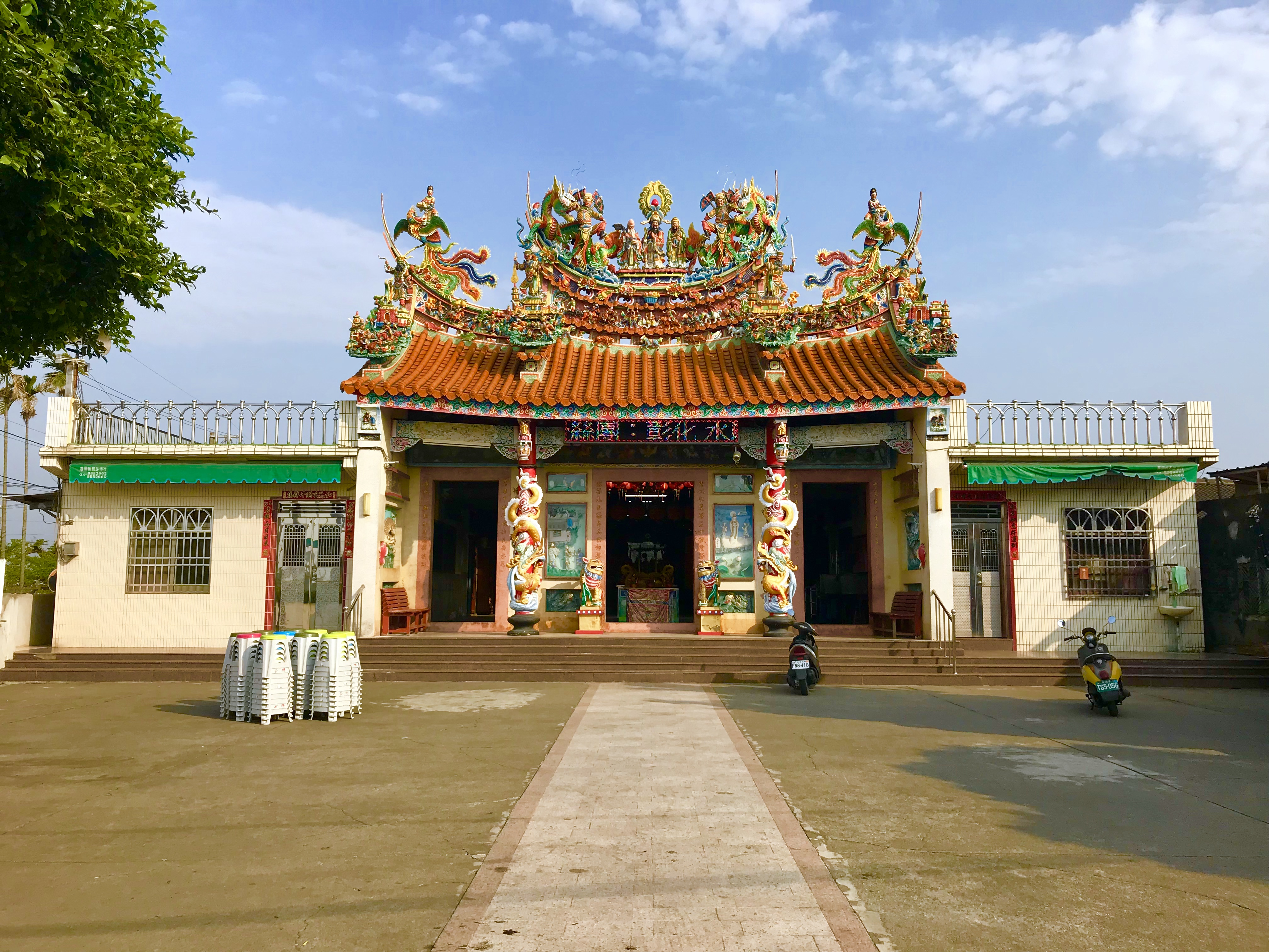 中文（台灣）: 水尾震威宮正面照